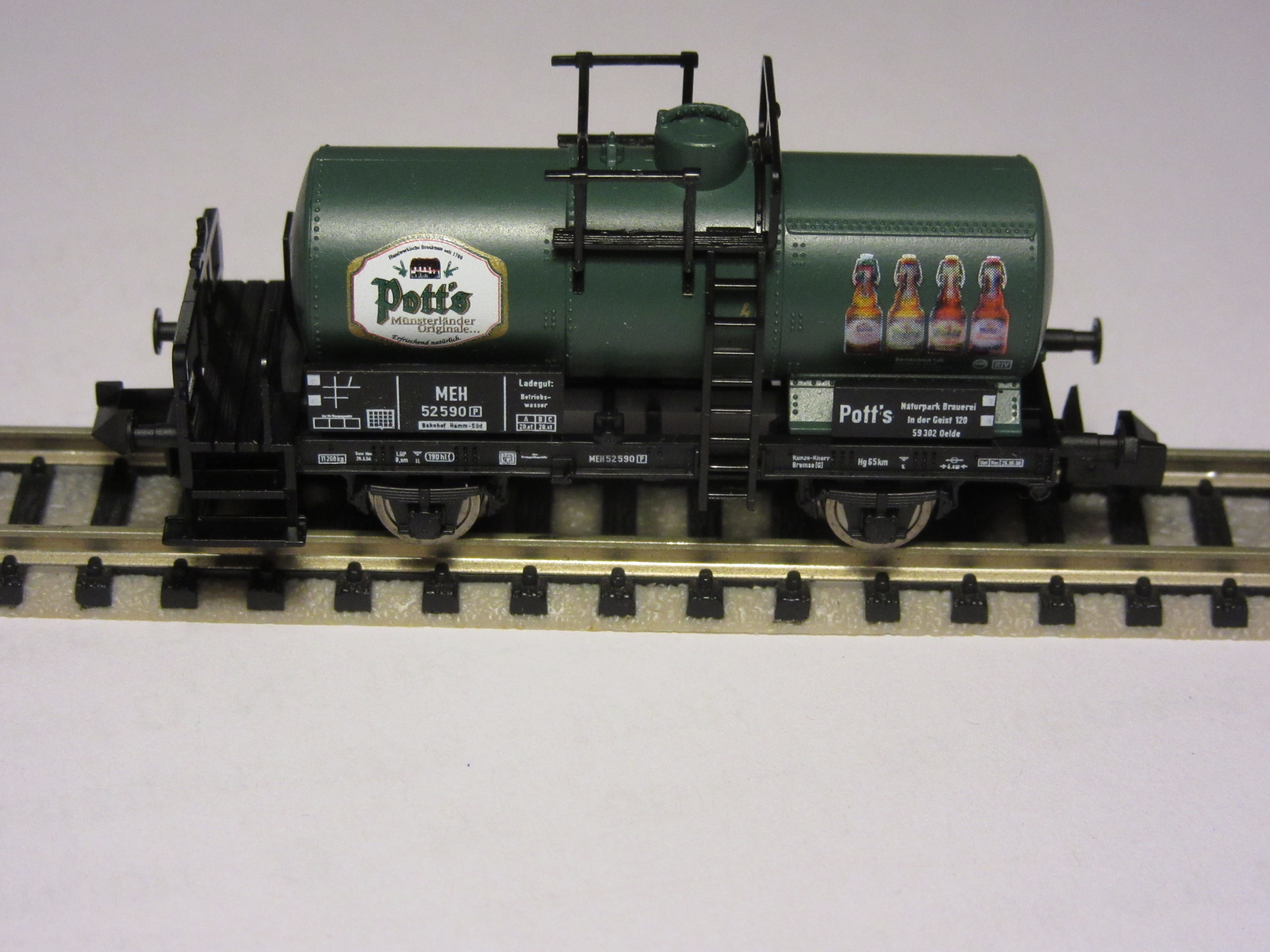 Kesselwagen der Firma Potts in Oelde, Modell der Firma Fleischmann in Spur N, Nr. 8426 11